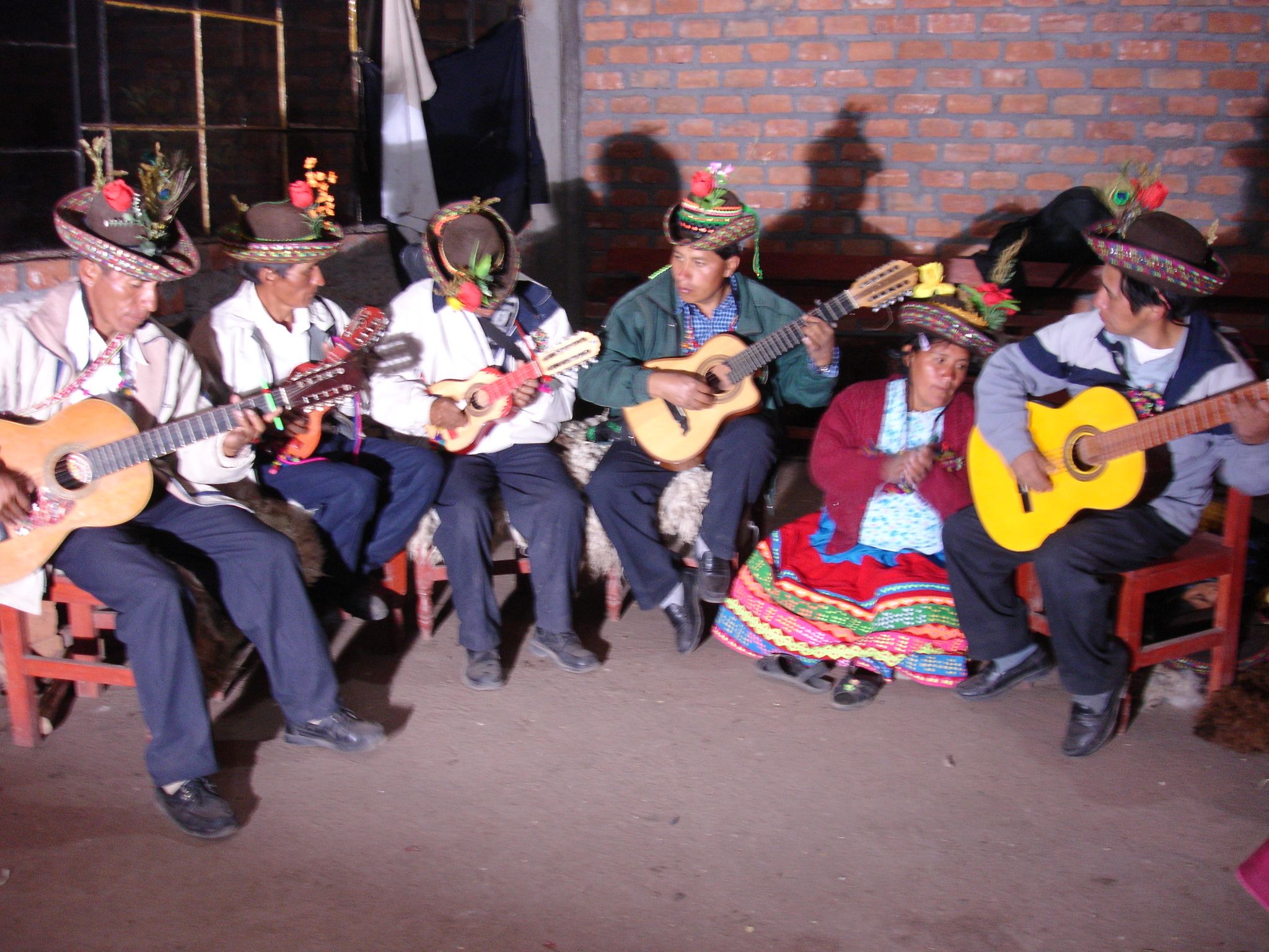 agrupación de musica andina del distrito de Chuschi - Ayacucho - Perú